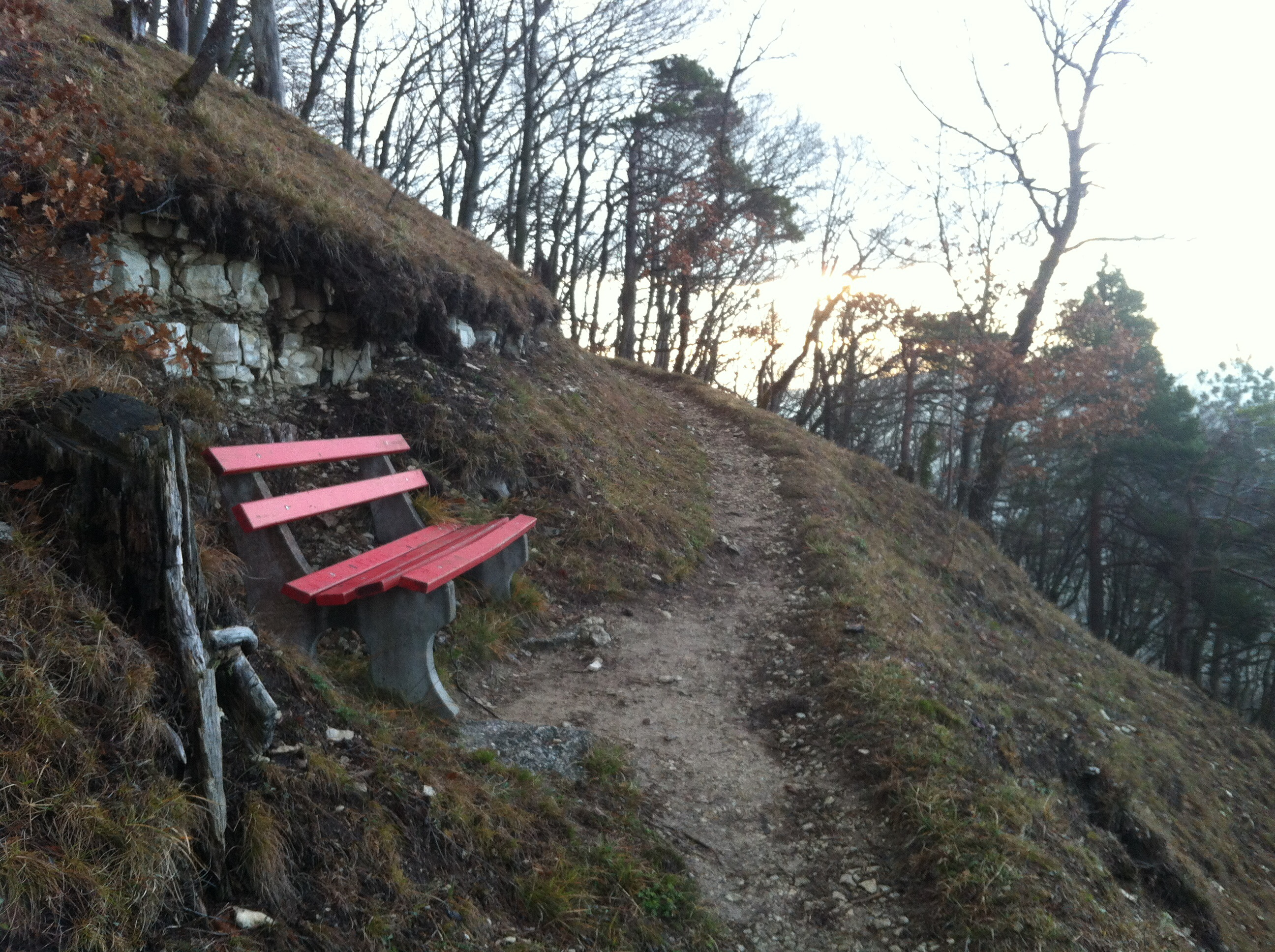 Küssaburg im Landkreis Waldshut, Baden-Württemberg. Umfeld: Fußweg zur Burg.